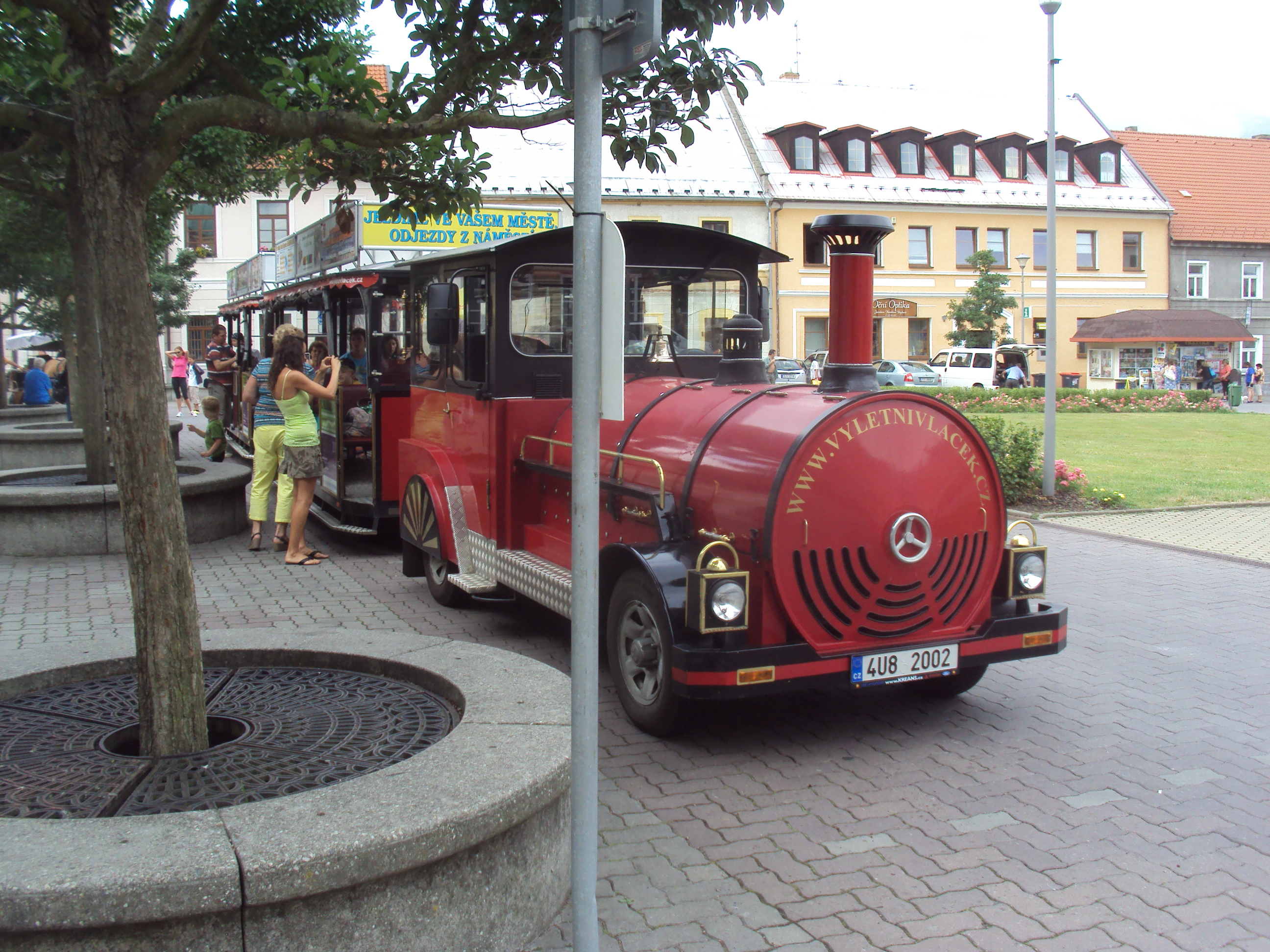 Česky: Vláček v Doksech